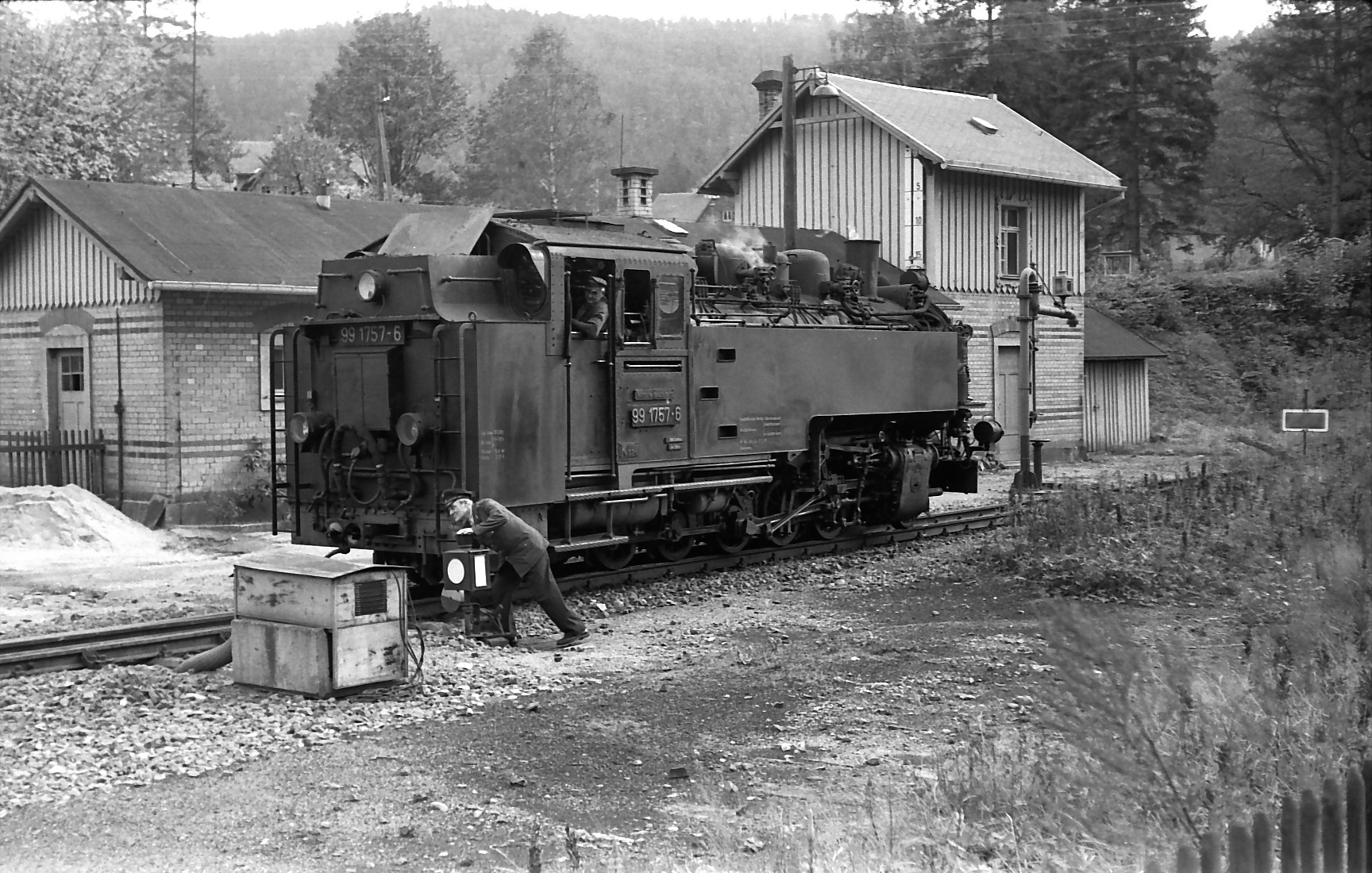 DR-Baureihe 99.73–76 im Bahnhof Kurort Oybin.